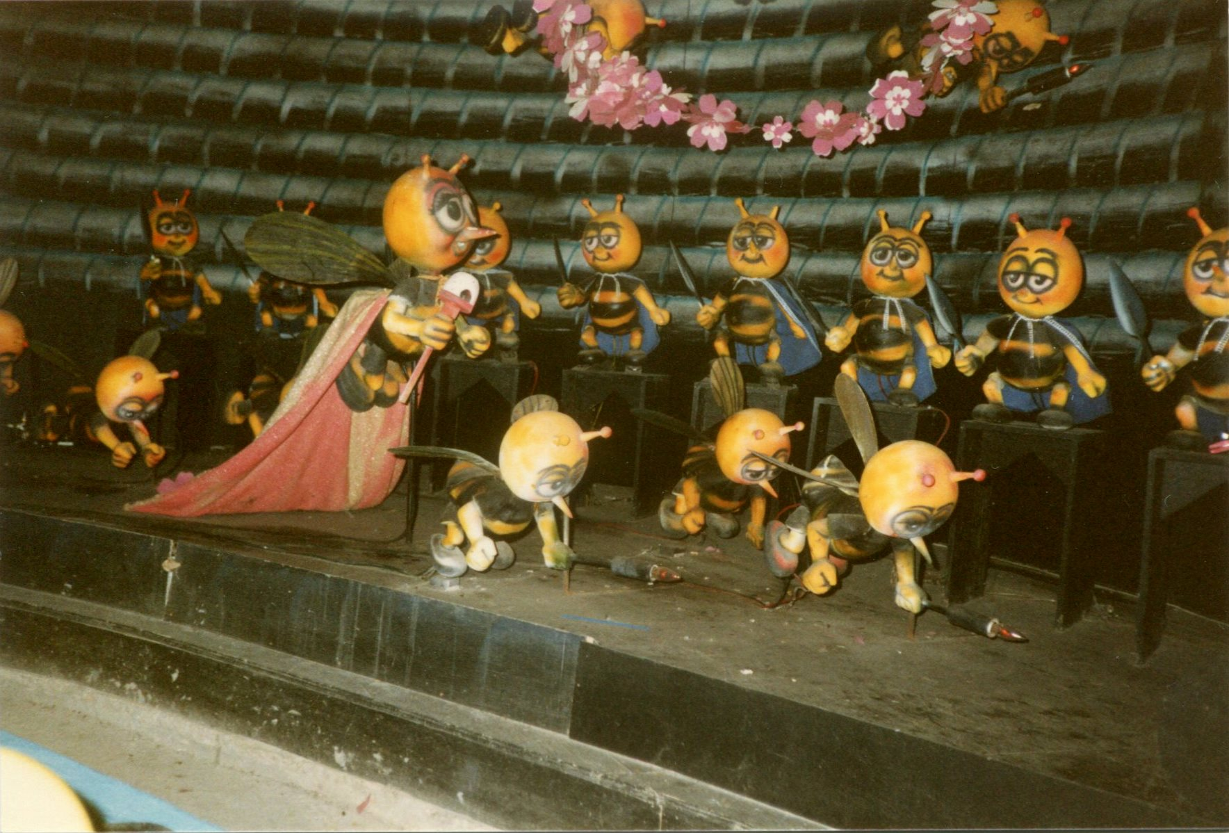 MeliparkApirama